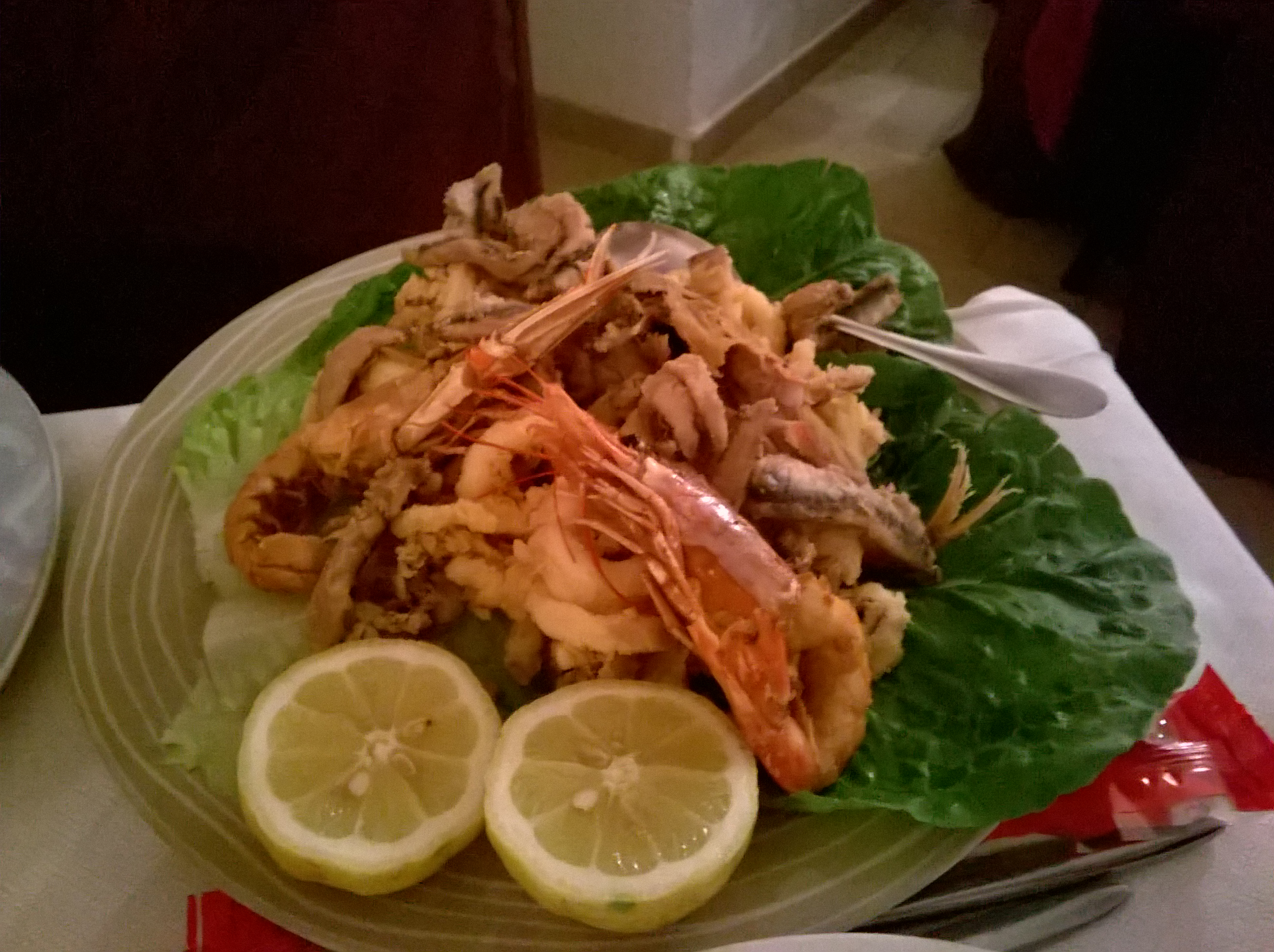 Siracusa: fritto misto di pesce (gamberi e calamari) con limone su foglia di lattuga.